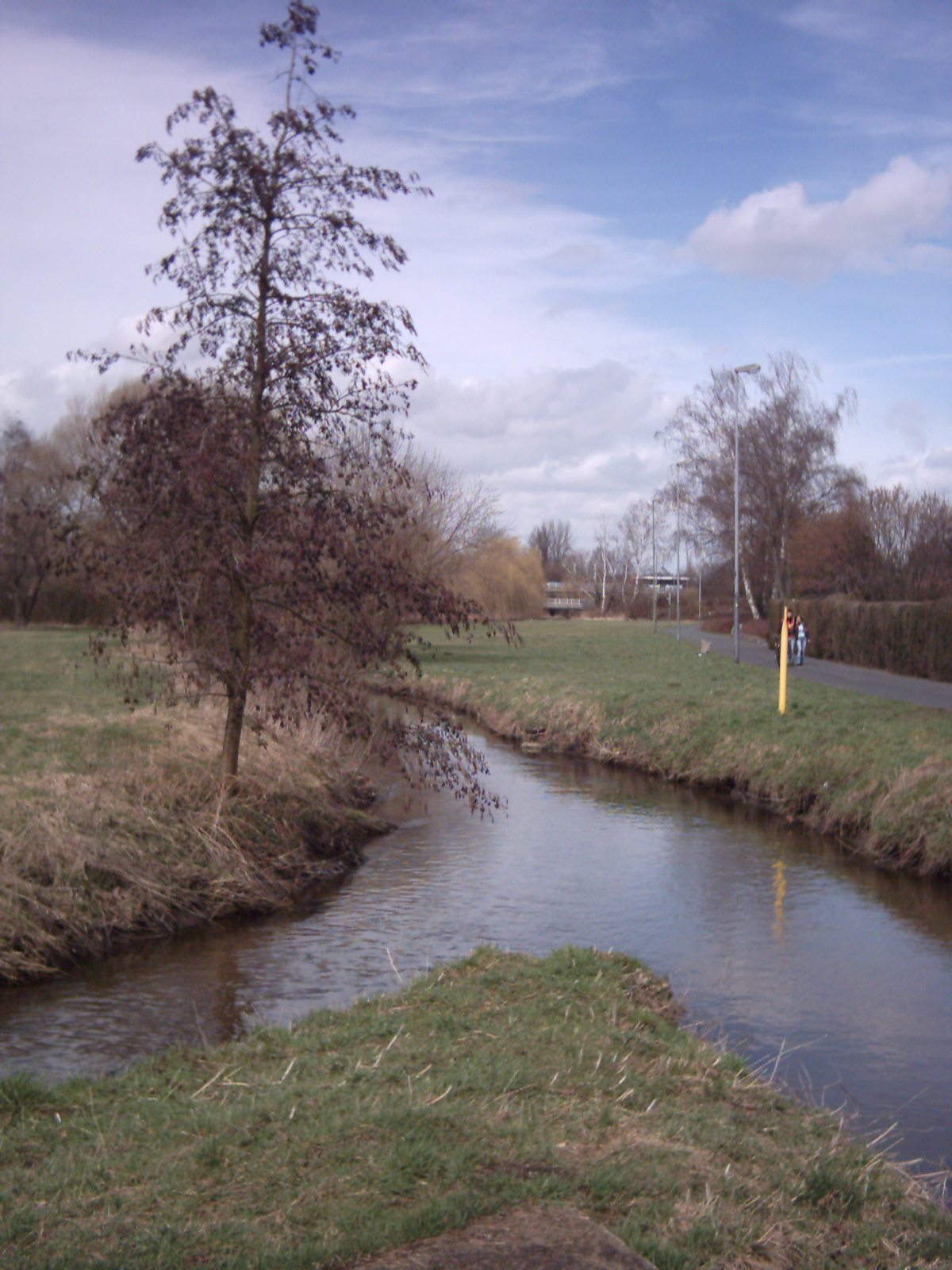 Mündung der Bieber (links) in die Rodau (rechts), nördlich des Mühlheimer Wohngebietes Markwald (Müllerweg)